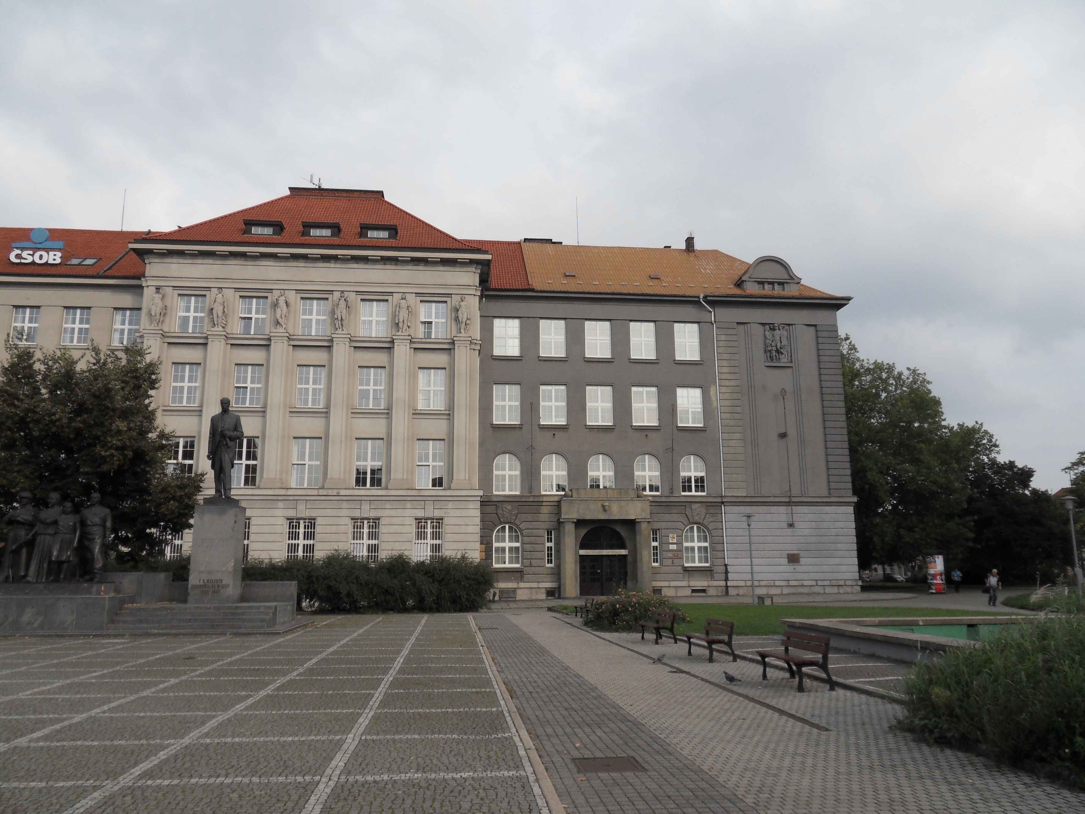 Obchodní akademie, Plzeň 3-Jižní Předměstí, náměstí T. G. Masaryka 1530/13, Plzeň.